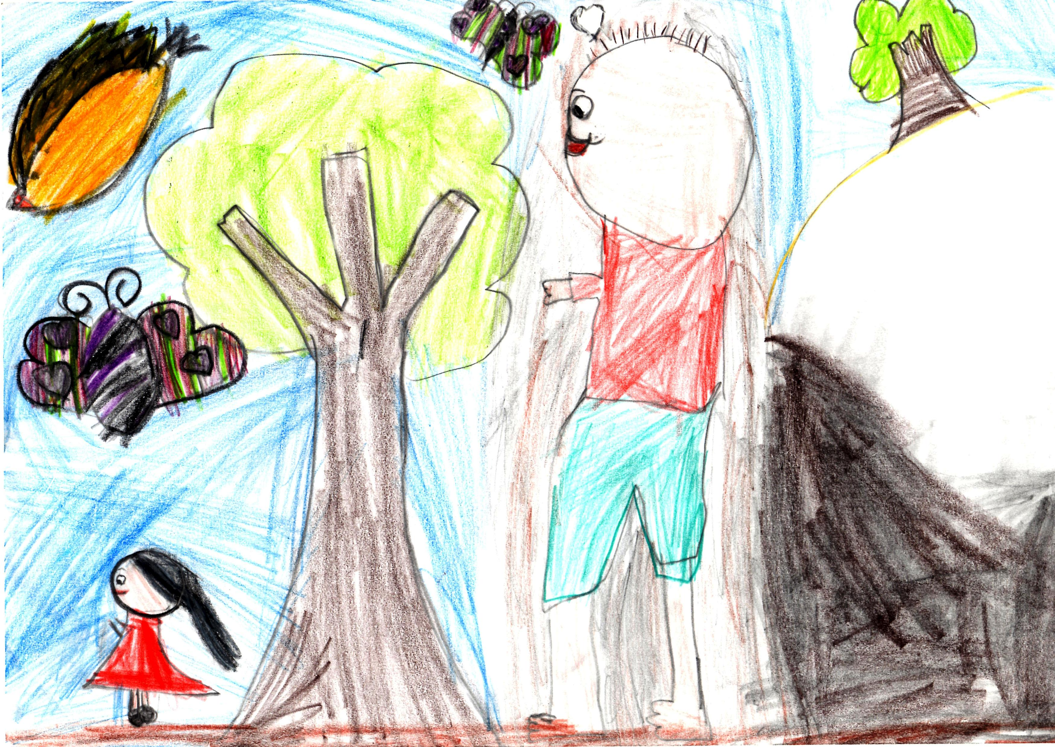 שלב הסכימה